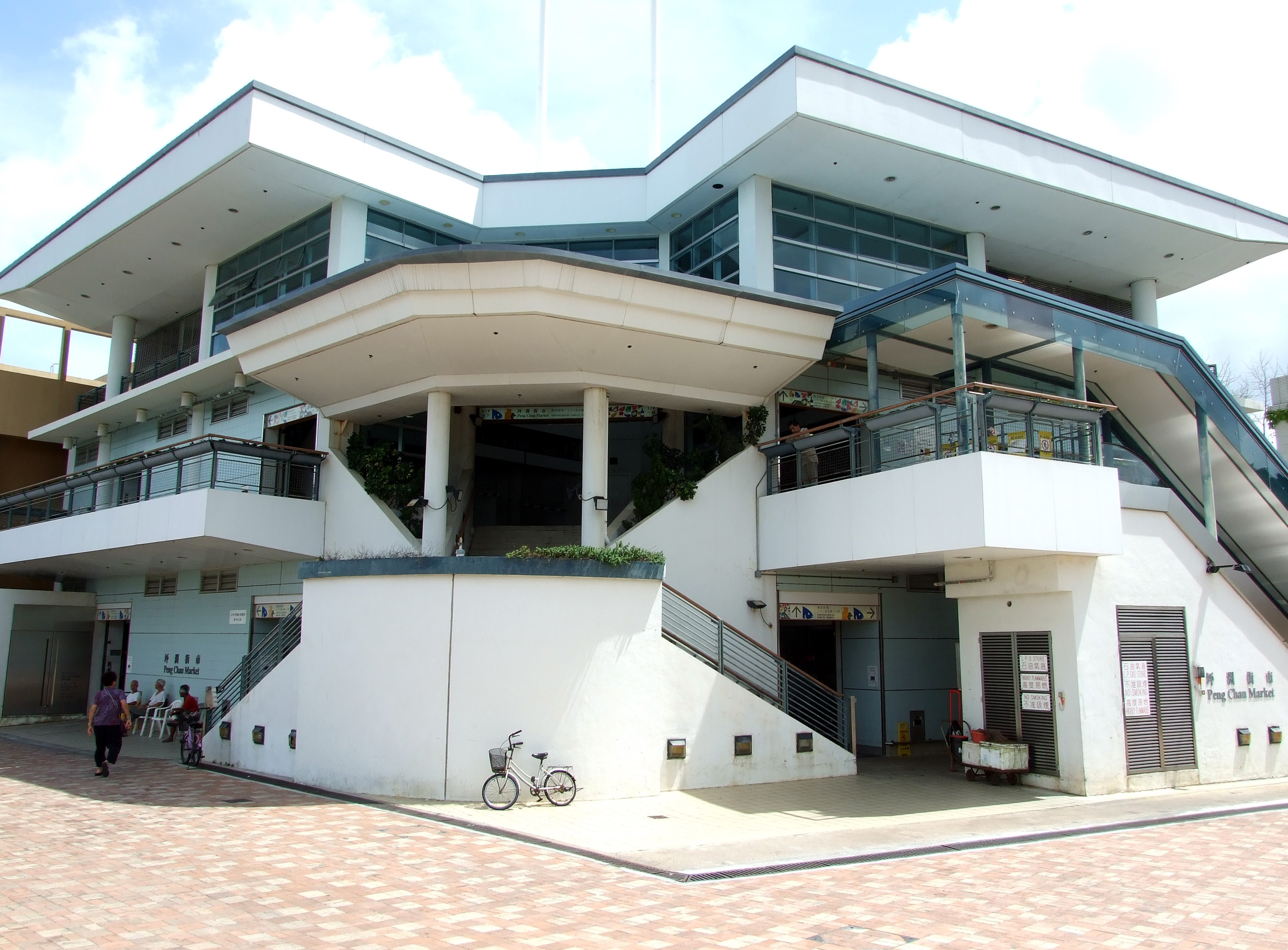 中文（香港）: 坪洲街市